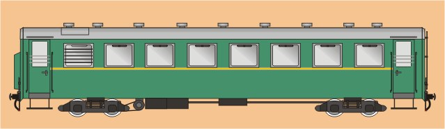 Pafawag